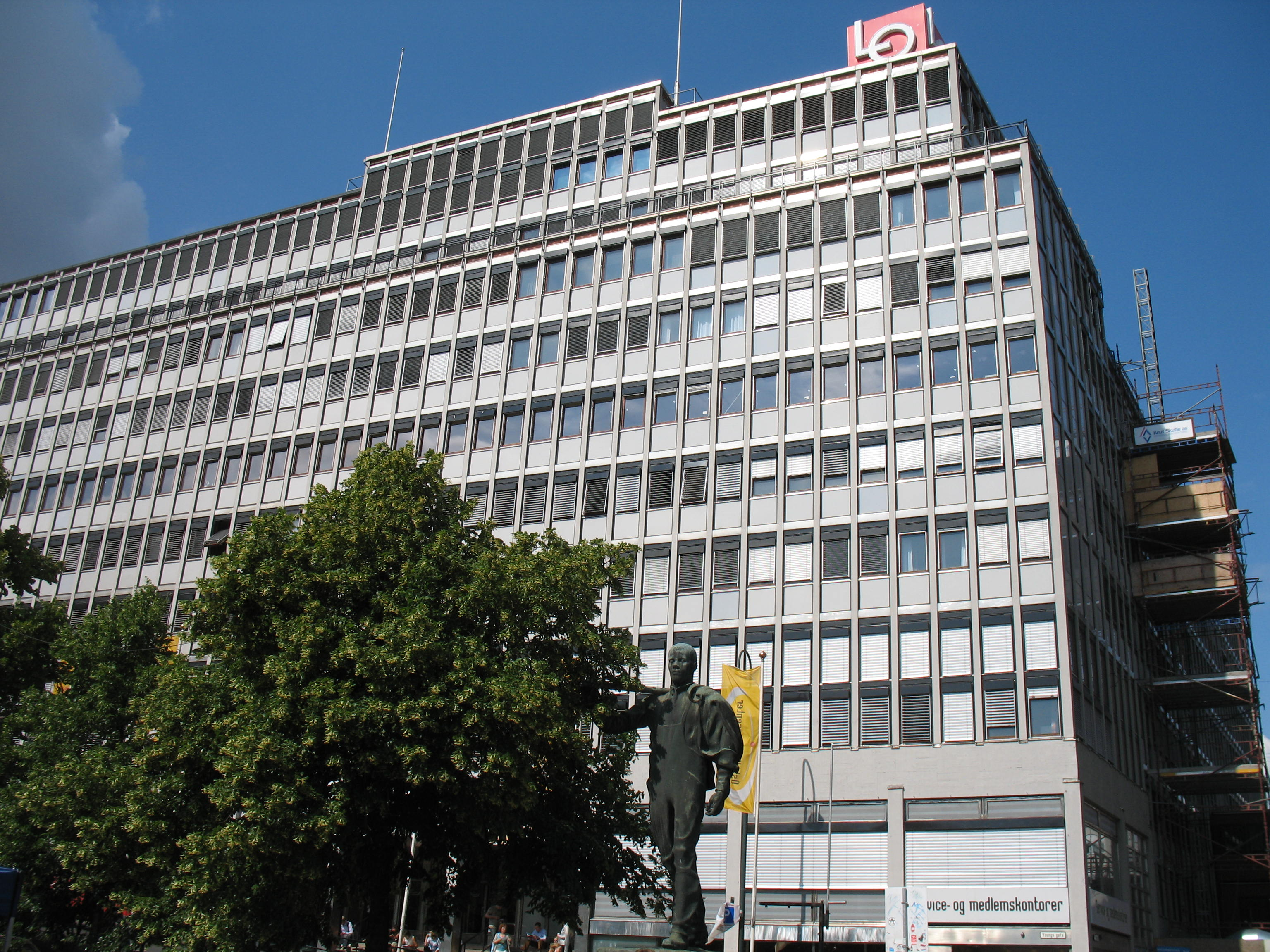 Folkets hus i Oslo. I forgrunnen ses en skulptur av Per Palle Storm